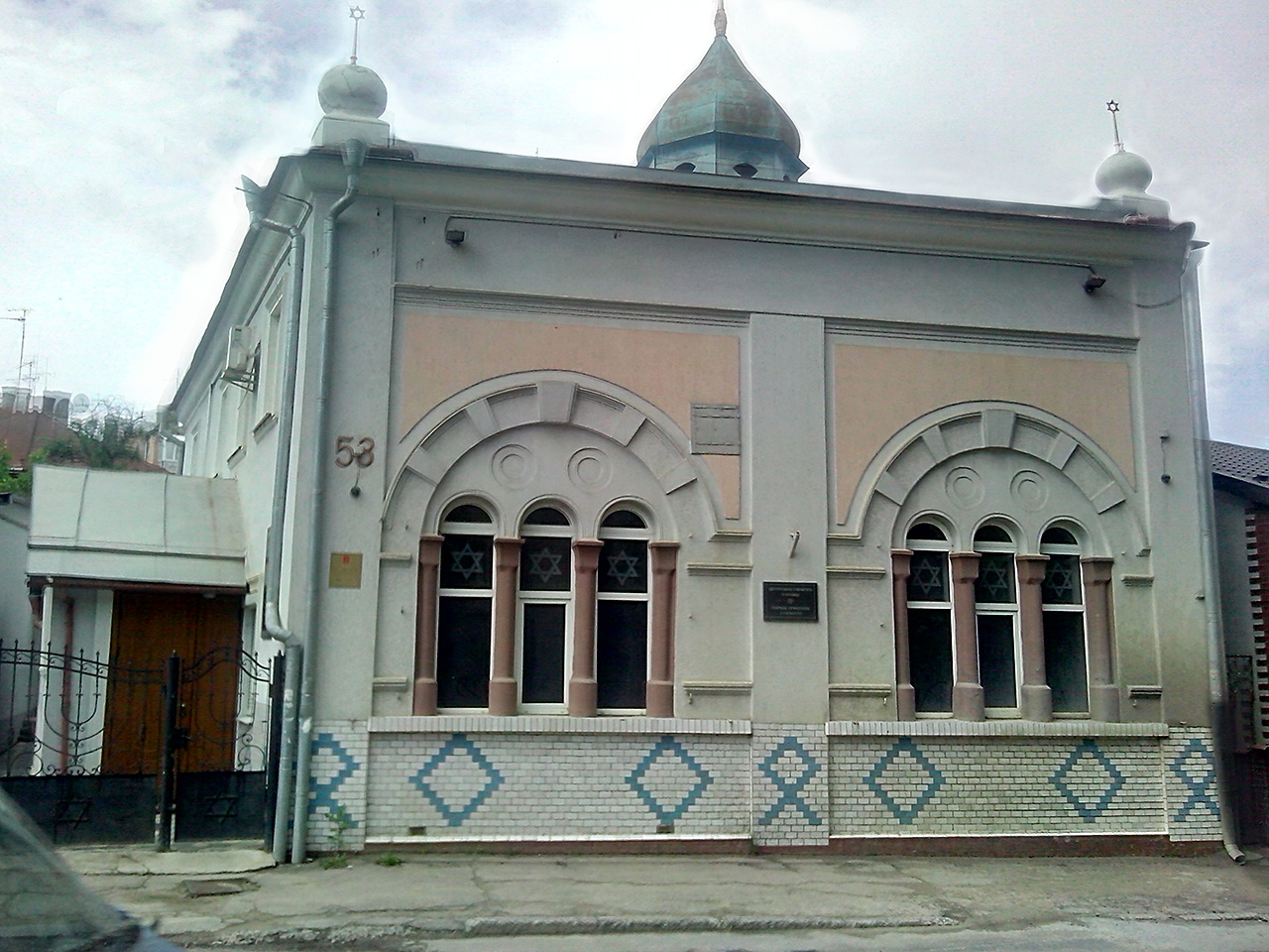 Синагога Бейт Тфіла Біньямін у місті Чернівці, Україна. Найстаріша синагога міста, відома своїми розписами стелі і стін (фото піддавалося ретушeванню для зменшення артефактів (духів) в результаті знімання на телефон в режимі HDR)